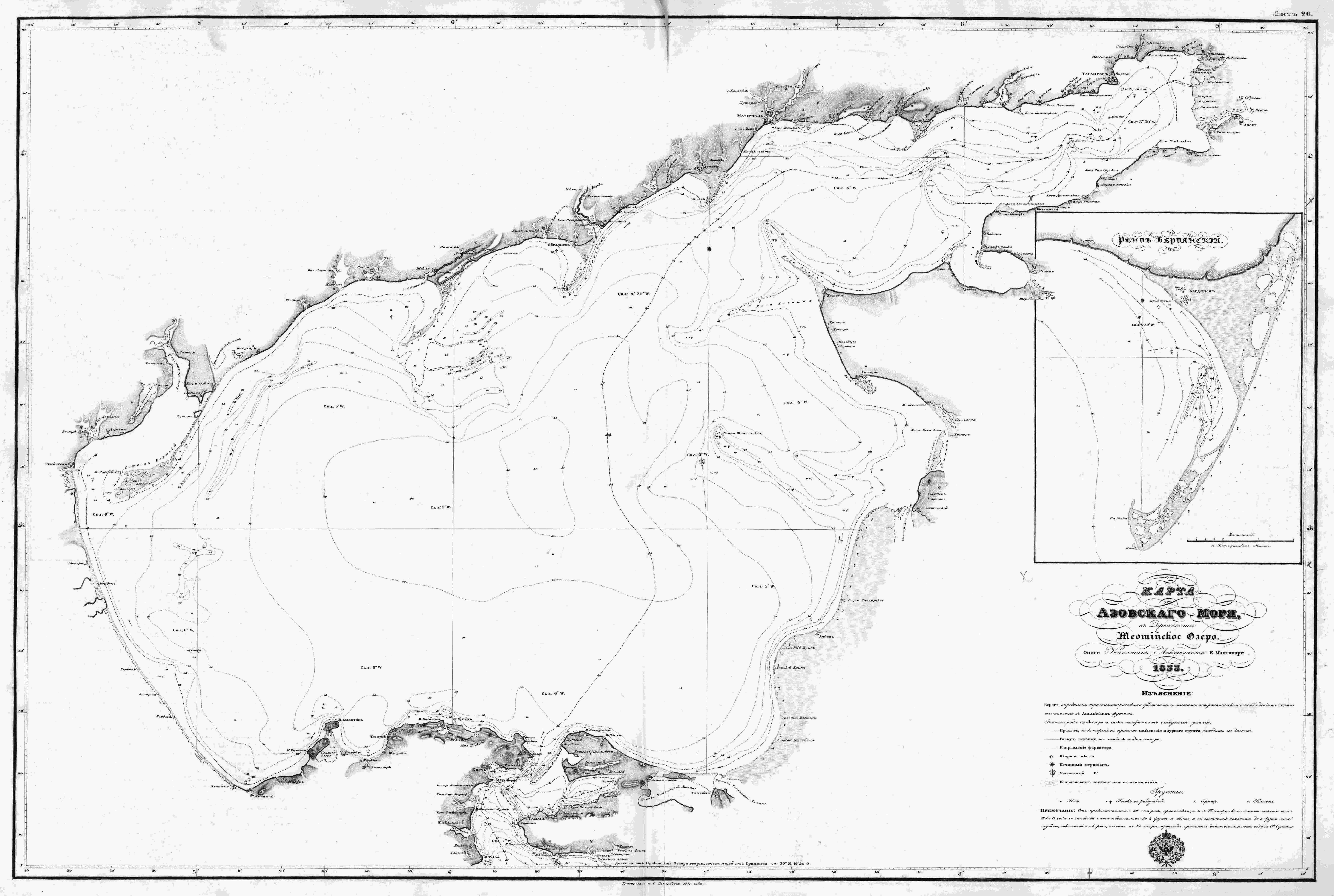 Карта Азовского моря 1833 года